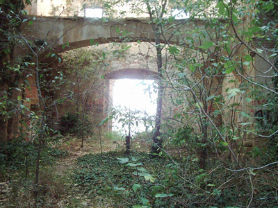 Puerta principal del Convento del Desierto en Calanda (Teruel)